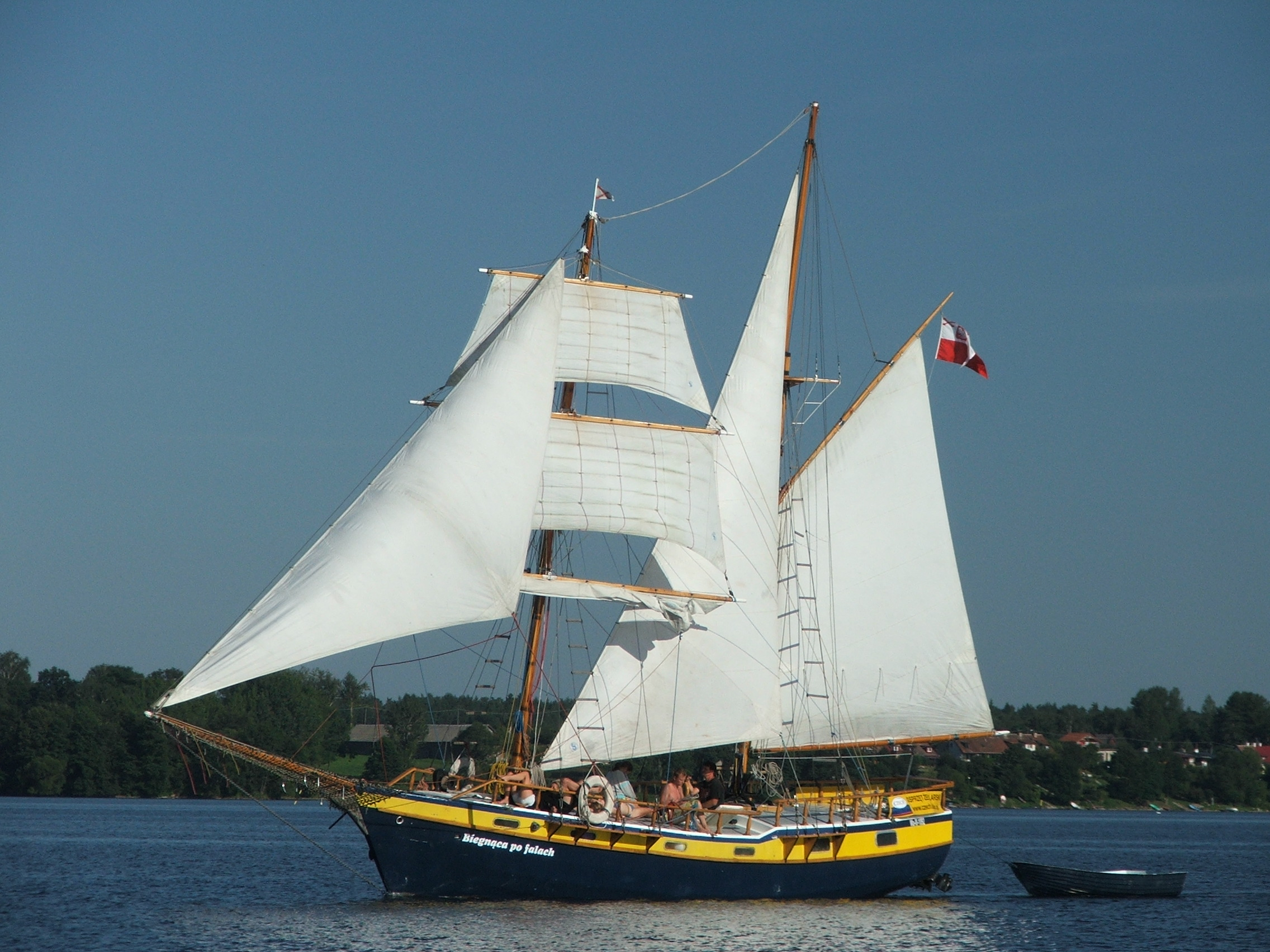 Biegnąca po falach (jez. Dobskie)